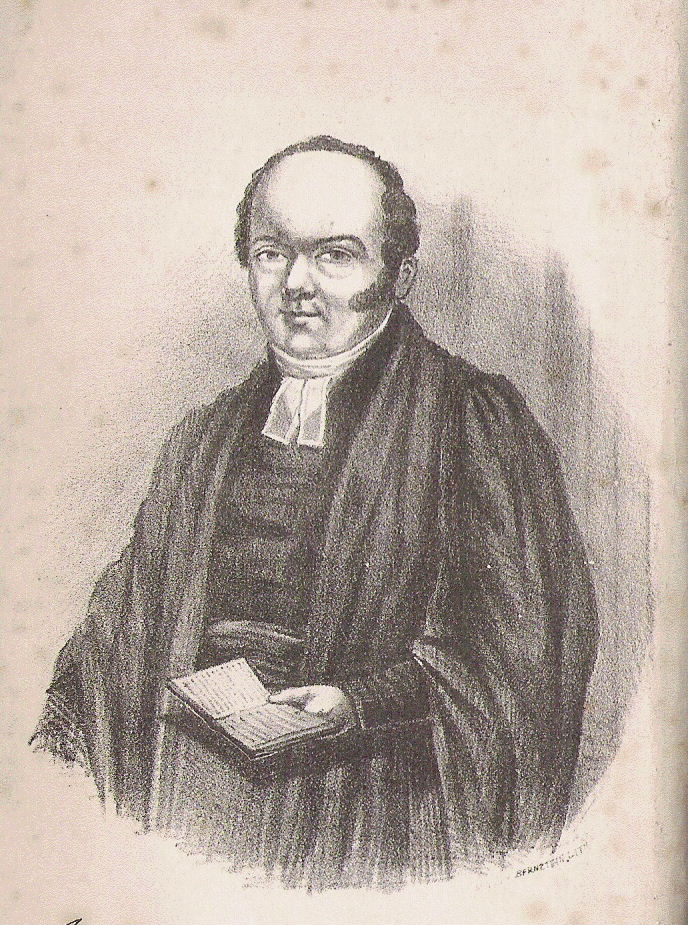 Engrafiad o John Blackwell o'r gyfrol Ceinion Alun (1851) [John Blackwell, bardic name Alun]